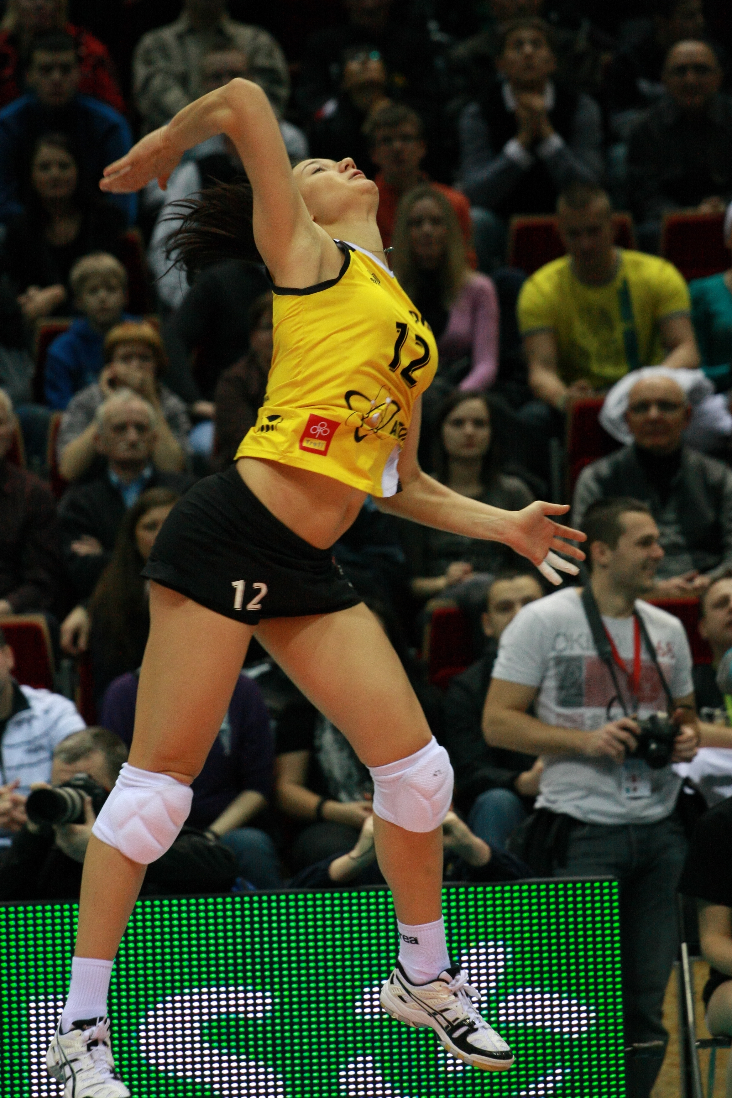 Atom Trefl Sopot vs Organika Budowlani Łódź